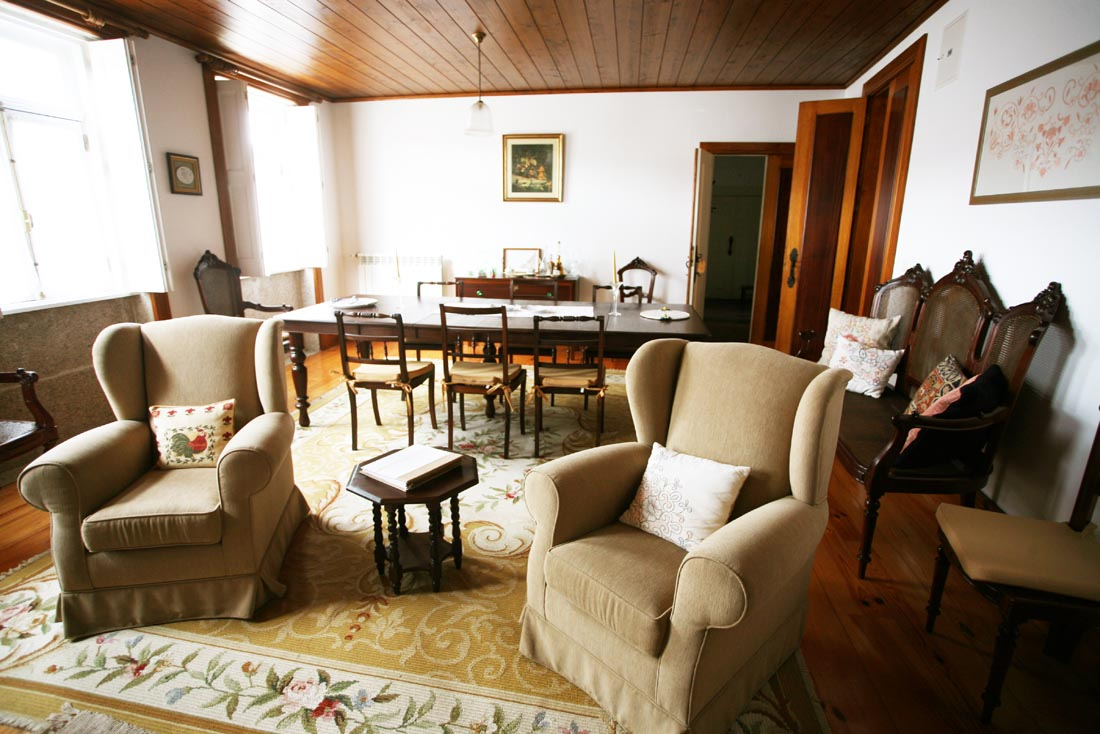 Casa São Miguel - Turismo Rural e Eventos - Gondomar: Salão de Jantar do Turismo